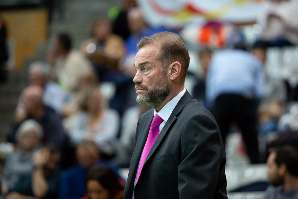 Néstor García, en un partido de liga del Montakit Fuenlabrada en el Olímpic de Badalona contra el Divina Seguros Joventut.